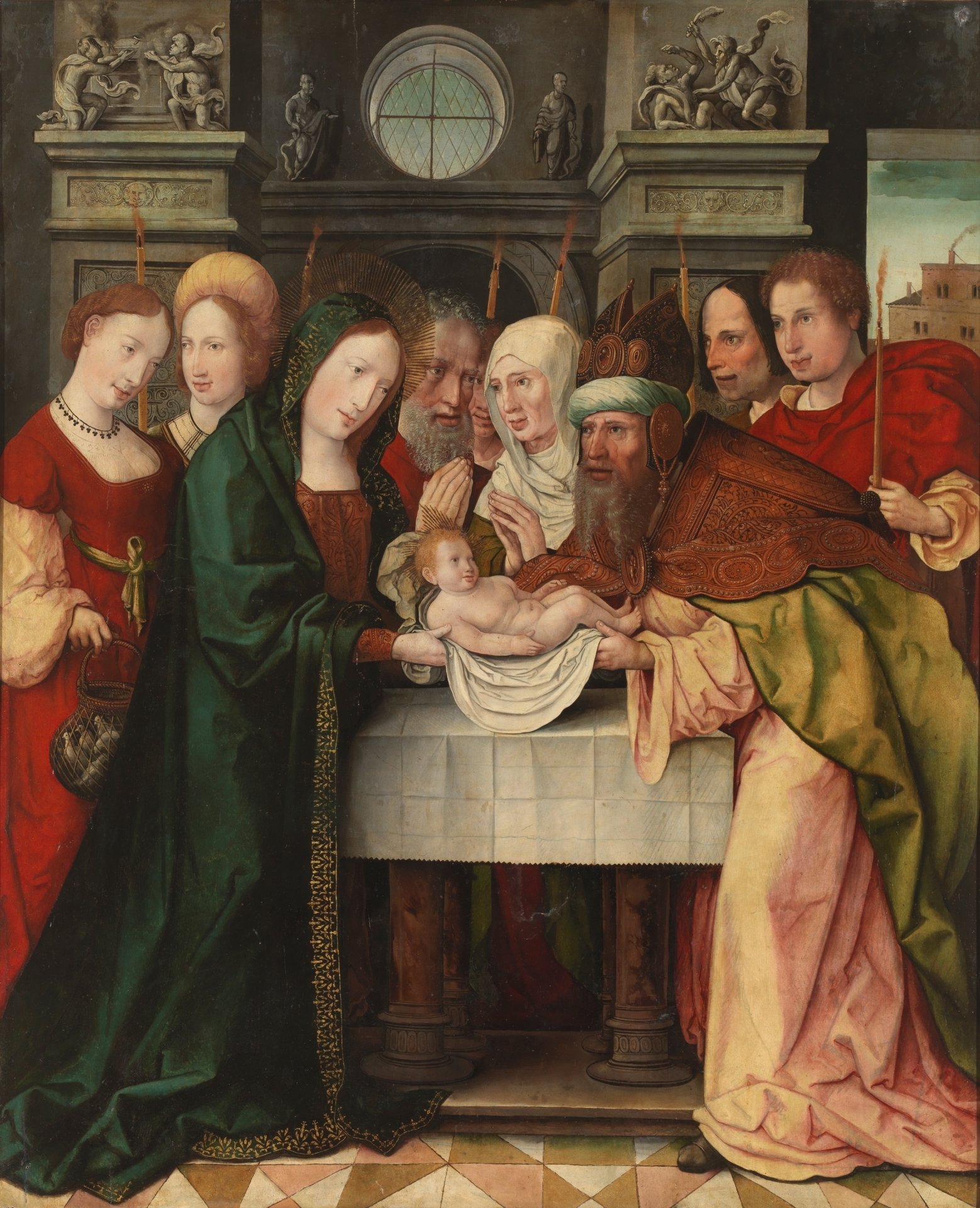 La obra representa la purificación de la Virgen María, madre de Jesucristo, en el Templo de Jerusalén.